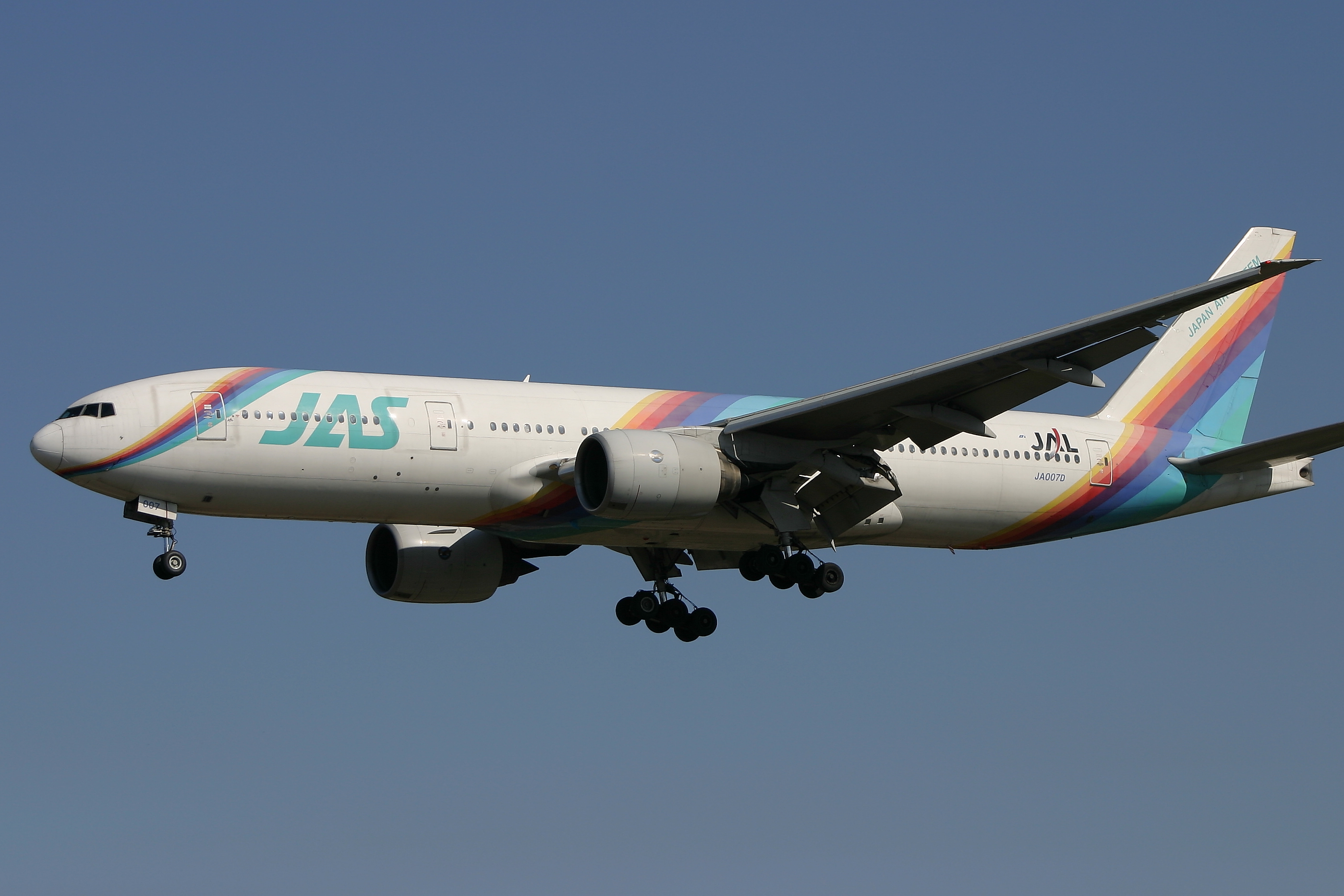 日本エアシステム ボーイング 777-289 JA007D 福岡空港